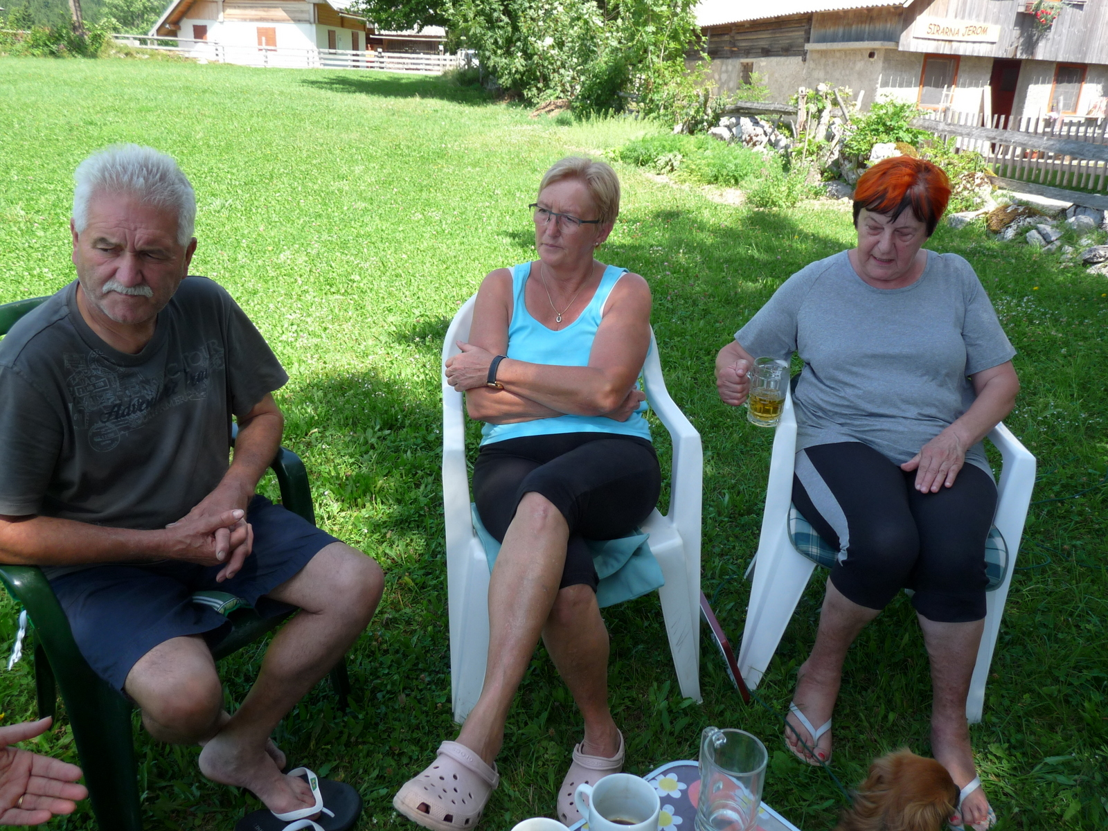 Janez in Nuša Božič (Benkova), desno